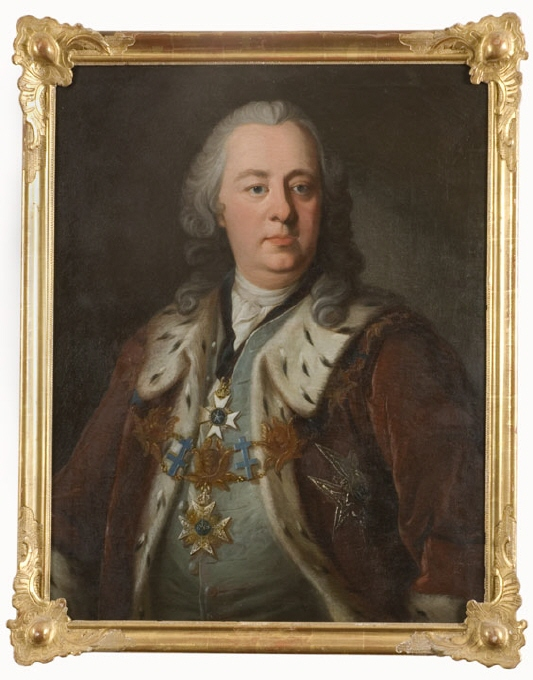 Carl Didrik Ehrenpreus, svensk, Född 1692, Död 1760. Avmålad av Per Fjellström, svensk, Född 1719, Död 1790. Kopia efter: Olof Arenius, svensk, Född 1700-12-16, Död 1766-05-05